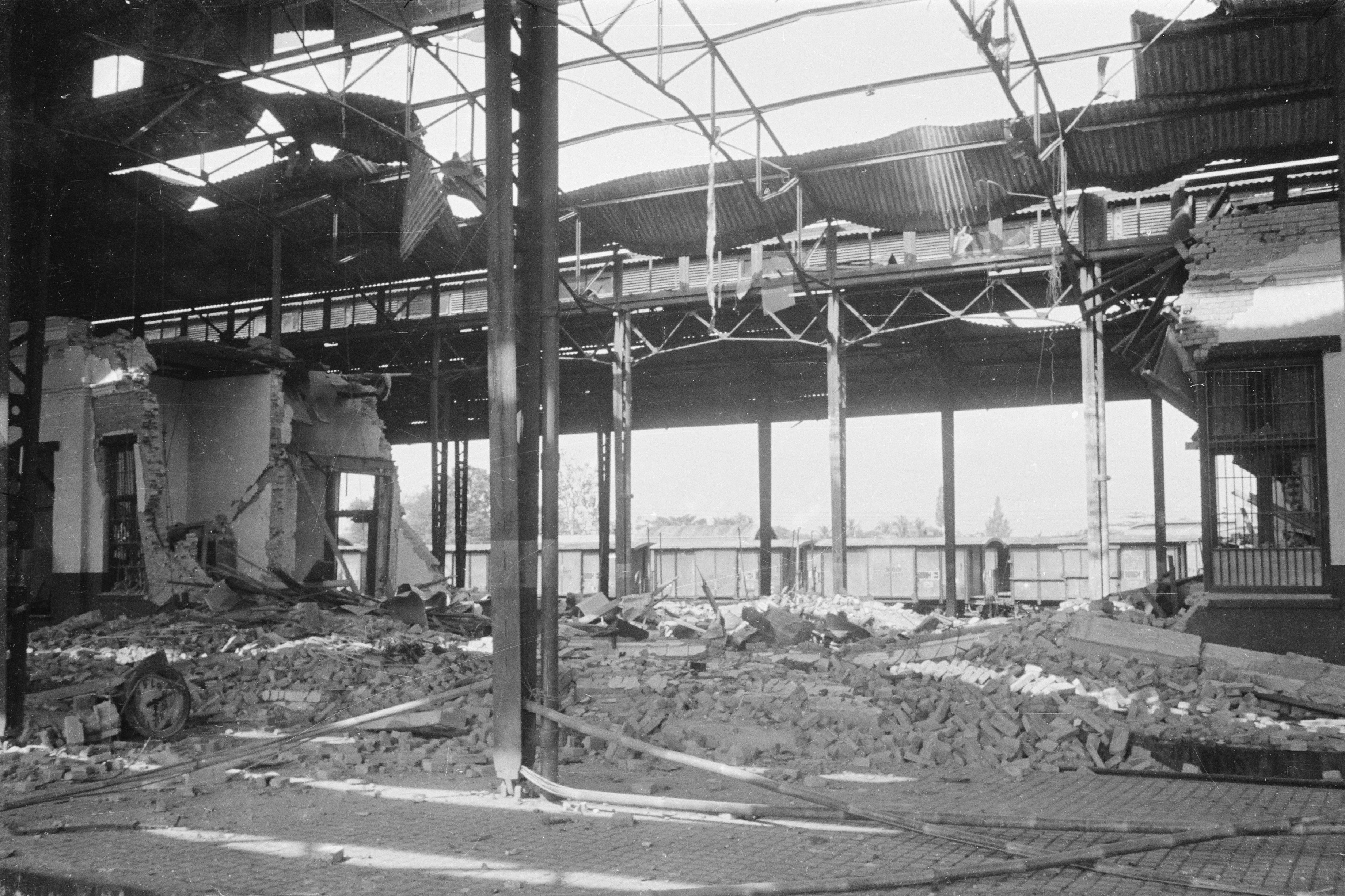 Collectie / Archief : Fotocollectie Dienst voor Legercontacten Indonesië Reportage / Serie : [DLC] Krawang, Poerwakarta, Tjikampek Beschrijving : Politioneel optreden Krawang-sector. [Interieur van het verwoeste spoorwegstation Tjikampek] Datum : 23 juli 1947 Locatie : Indonesië, Java, Nederlands-Indië Fotograaf : Fotograaf Onbekend / DLC Auteursrechthebbende : Nationaal Archief Materiaalsoort : Negatief (zwart/wit) Nummer archiefinventaris : bekijk toegang 2.24.04.03 Bestanddeelnummer : 273-3-1